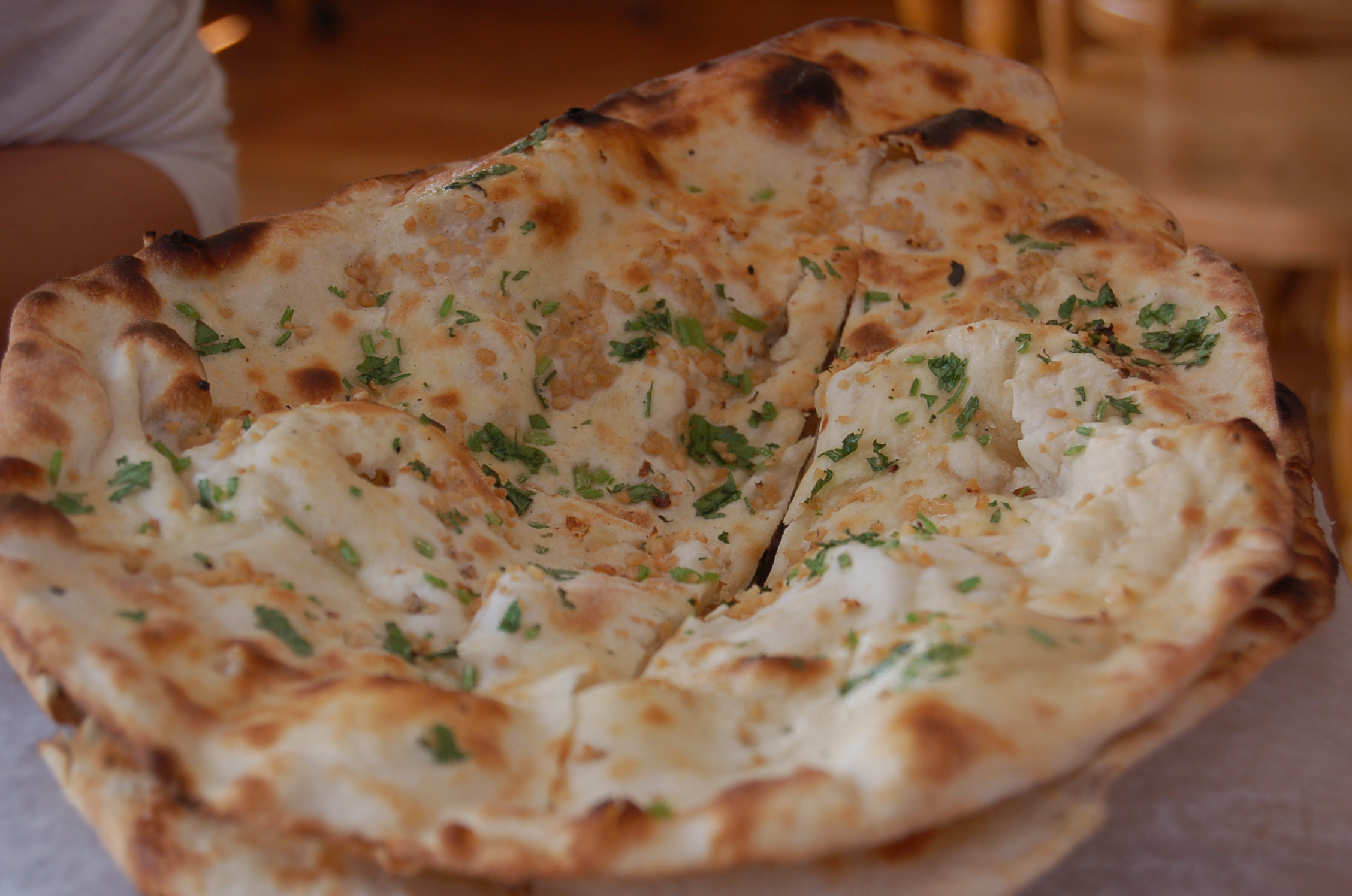 Annapurna Naan